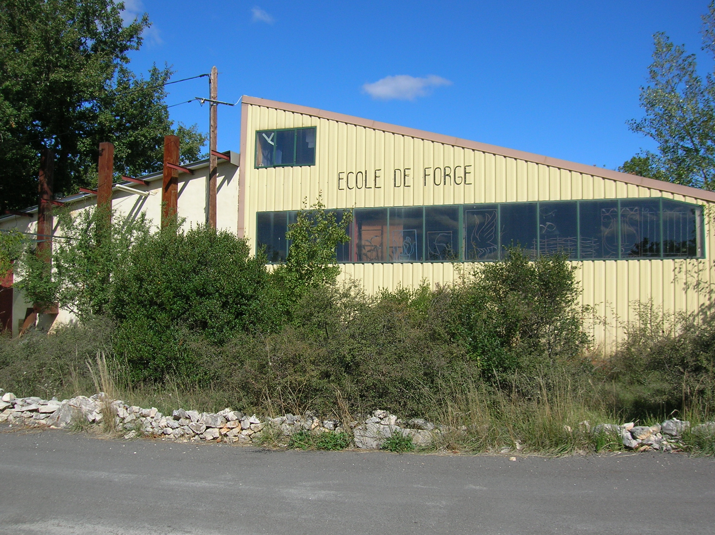 école de forge. Méjannes-le-Clap, Gard, Languedoc-Roussillon-Midi-Pyrénées, France.